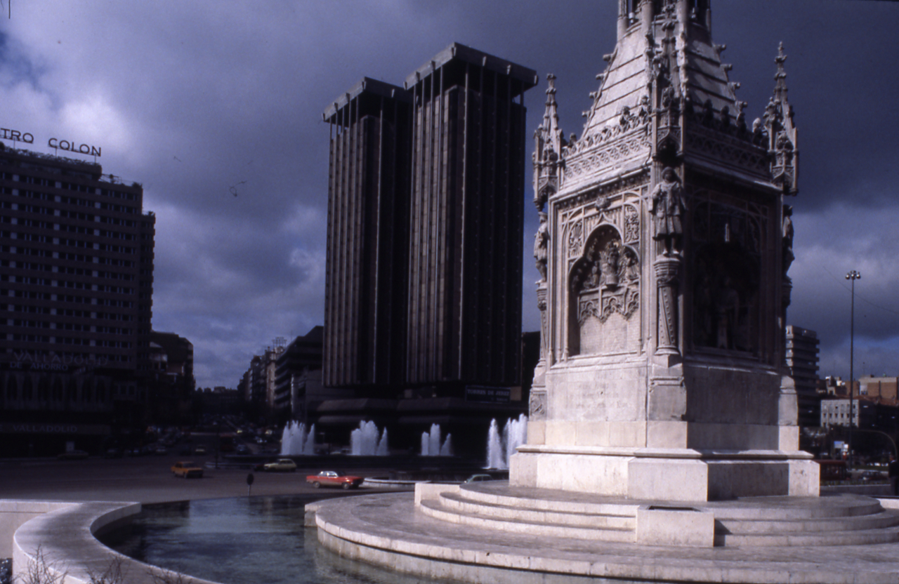 Servizio fotografico : Madrid, 1980 / Paolo Monti. - Foglio: 1, Fotogrammi complessivi: 20/20 : Diapositiva, sviluppo cromogeno/ pellicola ; 35 mm. - ((Fonte: Rubrica di Paolo Monti: Diapositive 24x36mm (1948-1982), presso Archivio Paolo Monti. Rubrica con elenco soggetti e numeri di inventario (da 1 a 1000) corrispondenti ai fogli a tasche in pvc in cui sono contenute le diapositive.